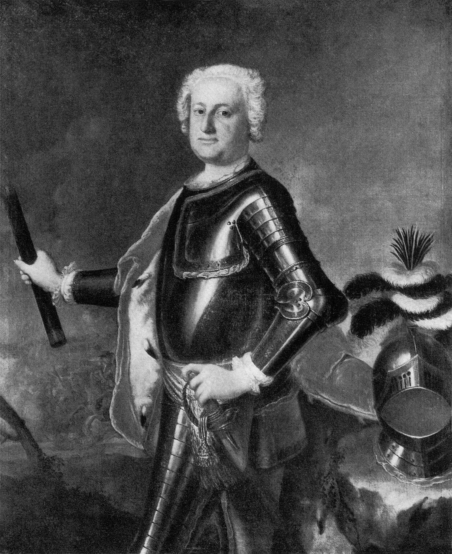 Georg Lisiewsky, Leopold Maximilian Fürst von Anhalt-Dessau (1700-1751). Öl auf Leinwand, 143 x 113 cm.